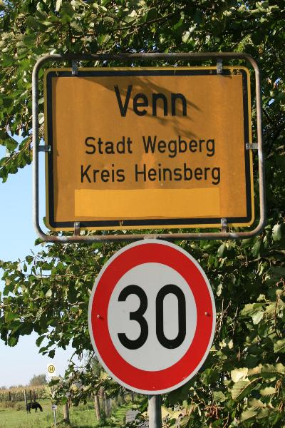 Ortseingang von Wegberg-Venn